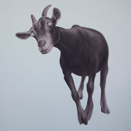 Obraz Barbory Bálkové; Koza, z cyklu Koza a jiné šelmy, akryl na plátně, 2011, 100x100cm (en: Barbora Bálková´s paintings)